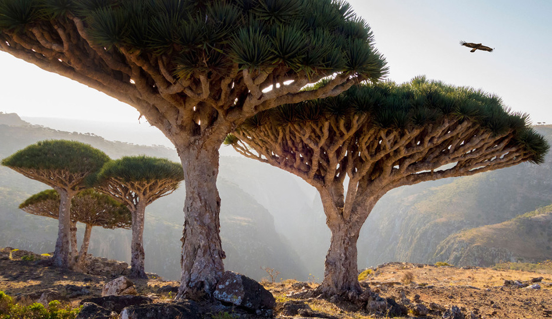 Дерева Xitsonga: Дерева